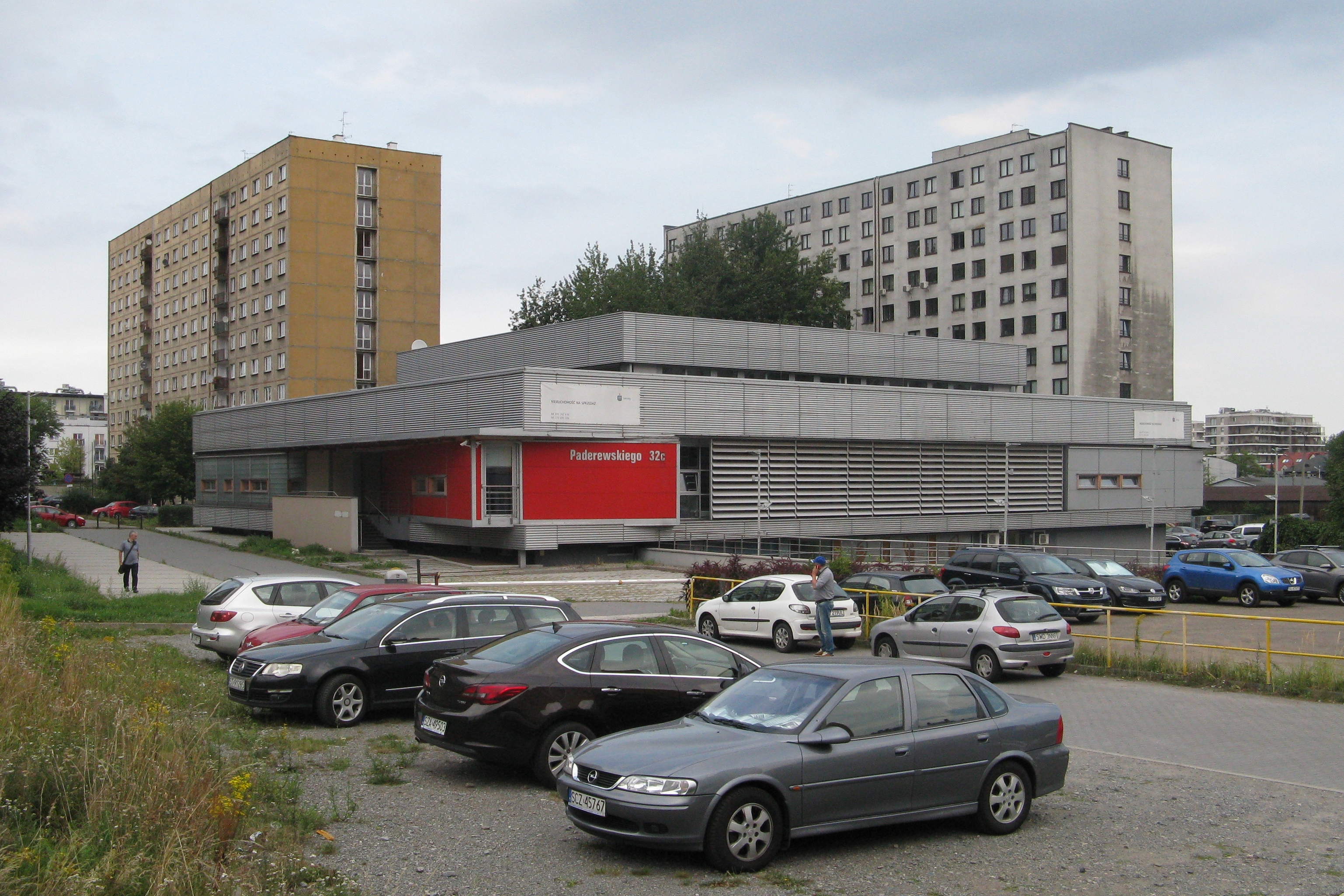 Katowice, budynek przy ulicy Ignacego Paderewskiego 32c.